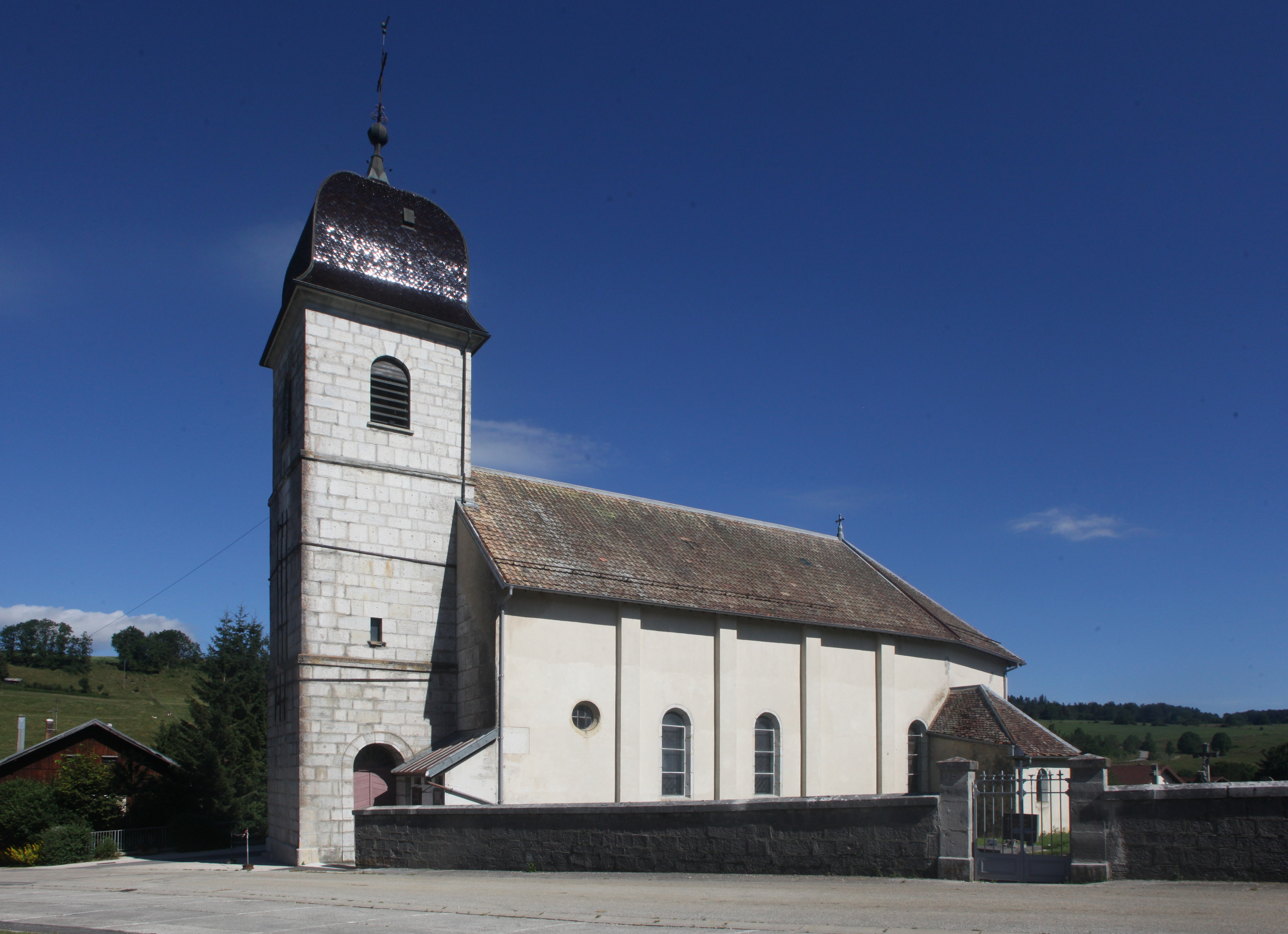 Église de Lièvremont (Doubs).